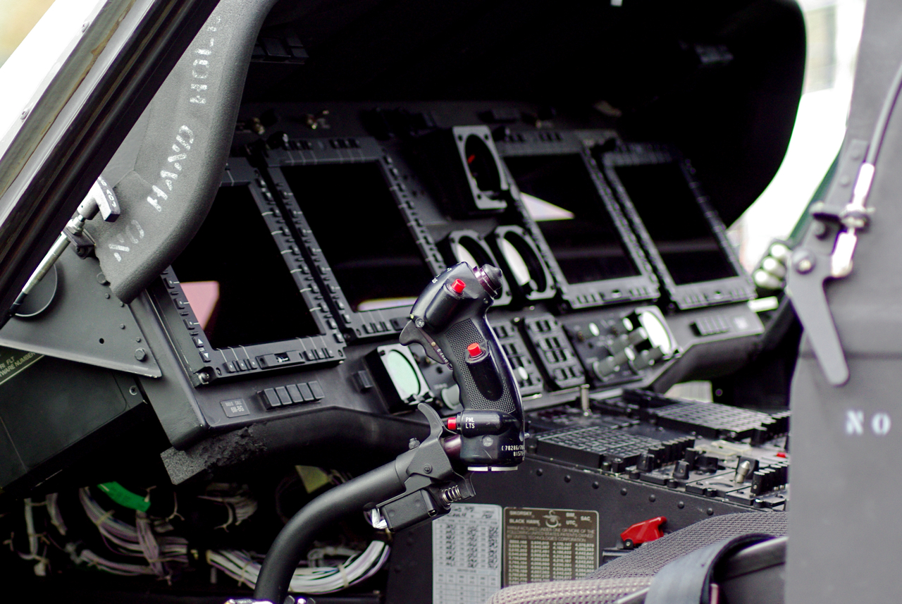 Poste de pilotage d'un faucon noir